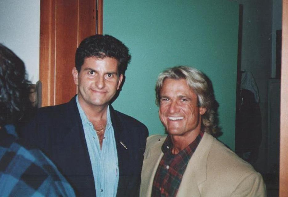 13 Maggio 1995 Paolo Tassetto con Tom Platz, Mr. Universo